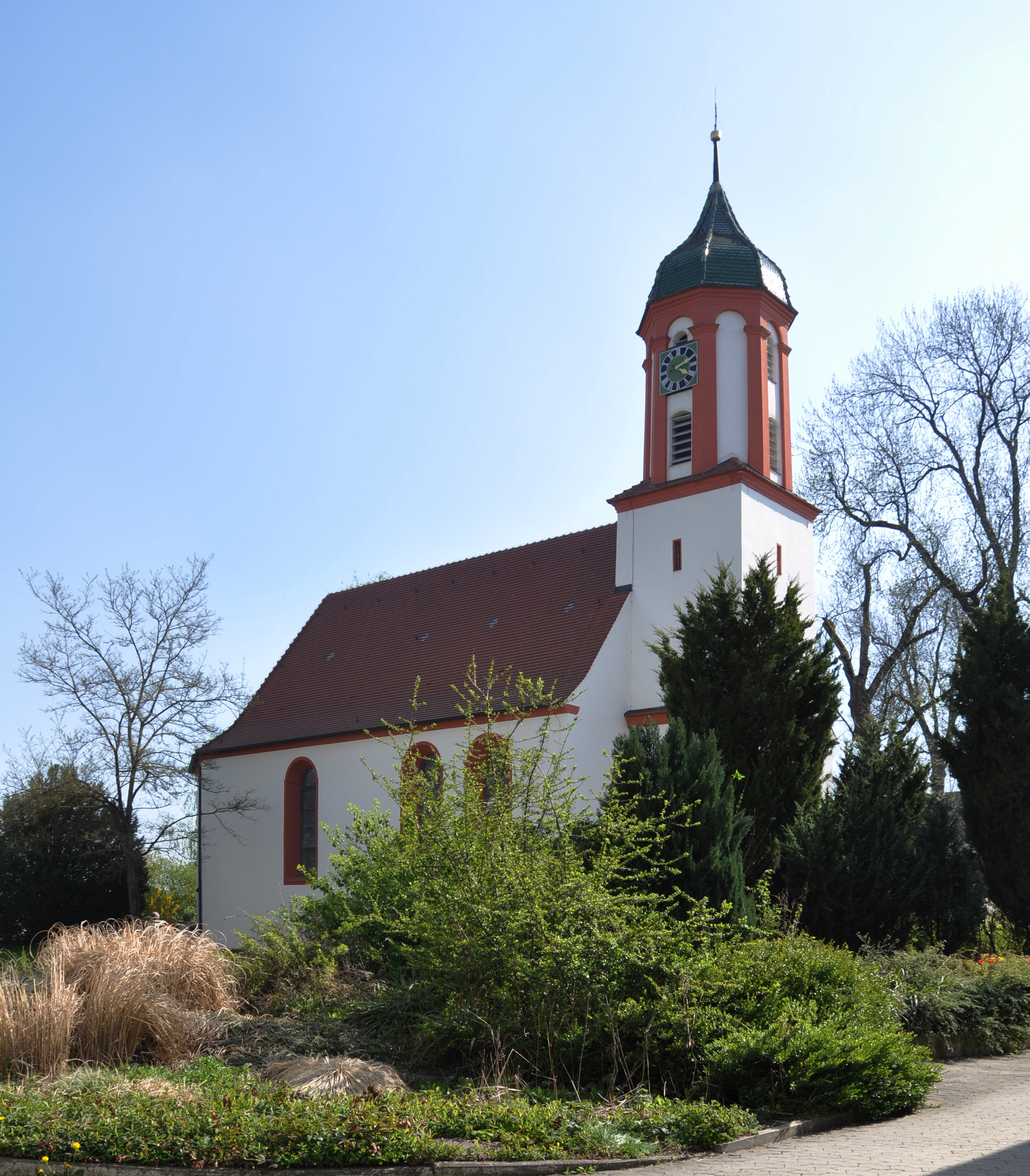 Heudorf am Bussen, Gemeinde Dürmentingen, Pfarrkirche St. Oswald